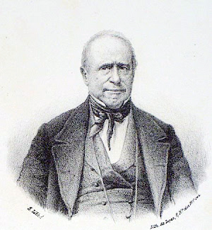 António José de Lima Leitão (1787 — 1856), médico, político, militar, escritor e professor